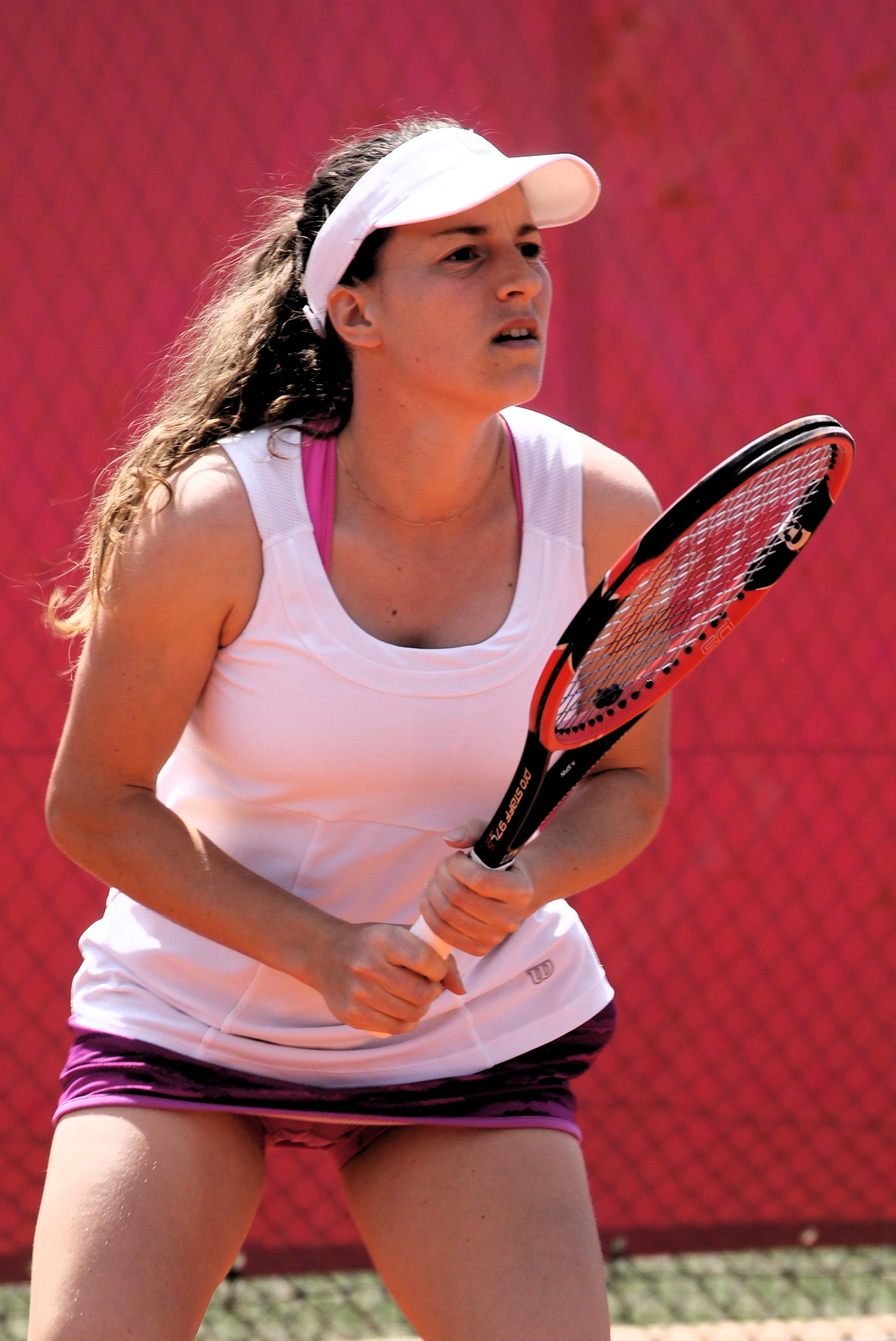 Karen Barbat Open ITF Cagnes 2016